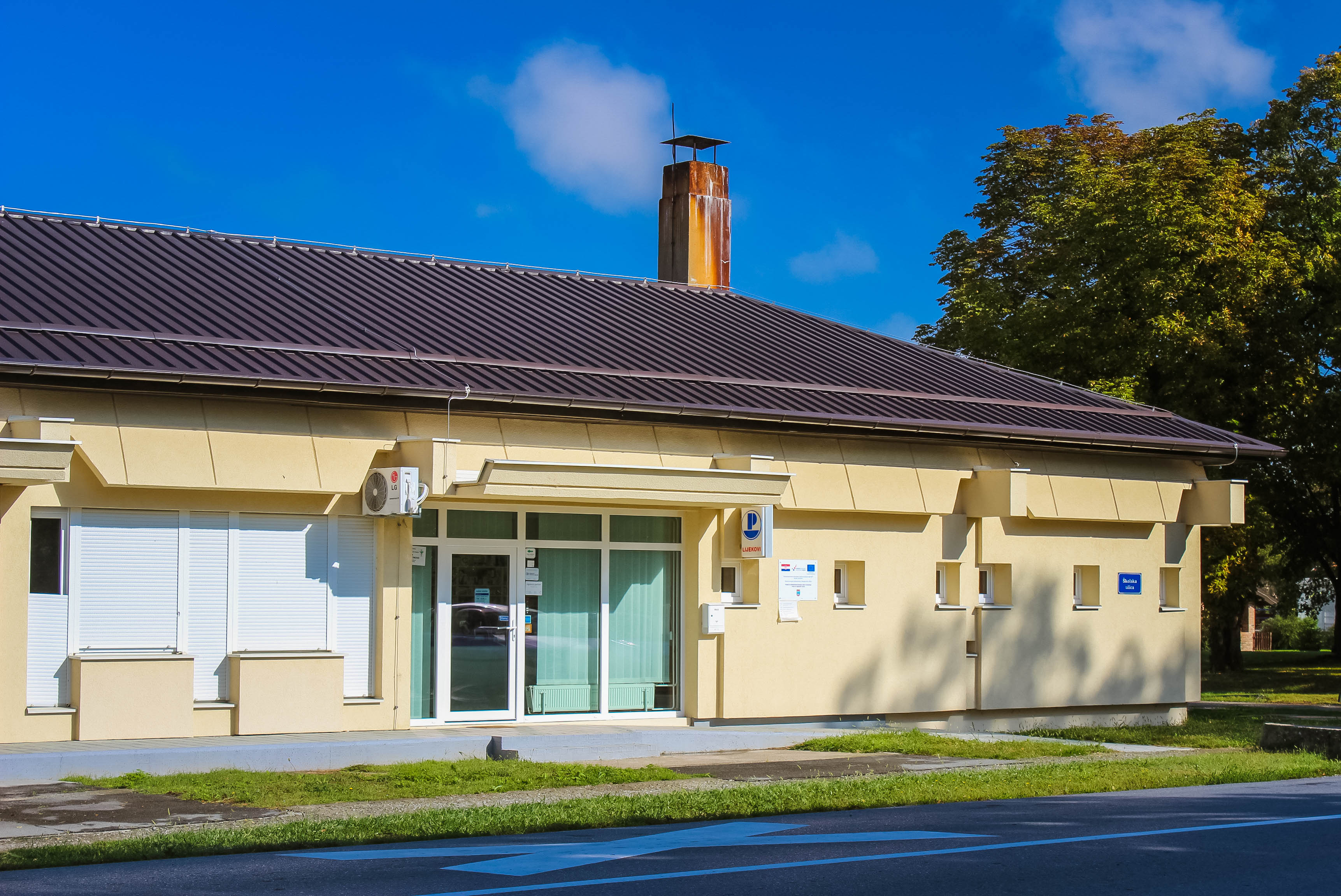 Dom zdravlja i ljekarna u Ernestinovu